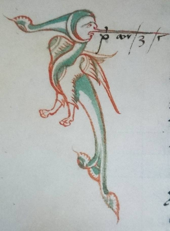 Animal Fantástico. Códices de Santo Martino.